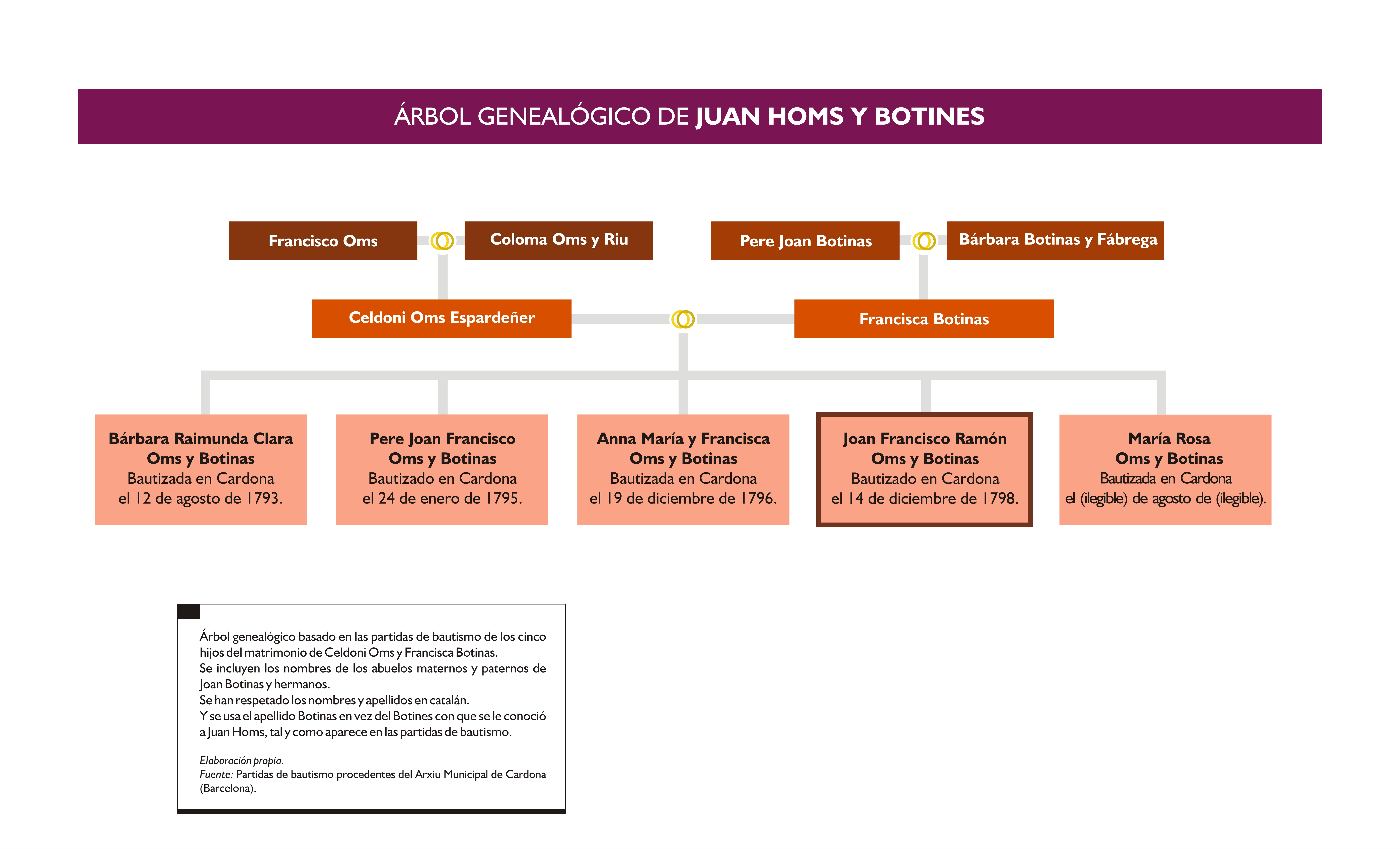 Arbol genealógico de Juan Homs y Botines